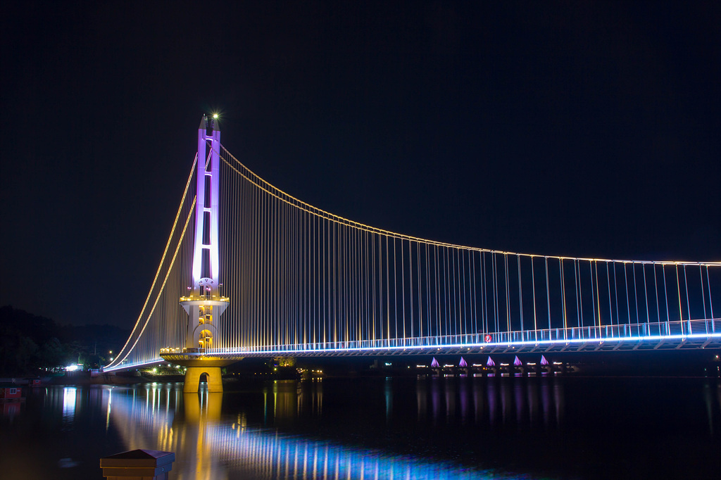 충남 예당호에 2019년 기준 국내 최대 규모의 현수교 형식을 빌려서 건설된 출렁다리이다. 매우 뛰어난 장관을 보여주는 국내 대표의 출렁다리이며 개통된지 50일여만에 100만명의 관광객을 유치하는 기염을 토했다.